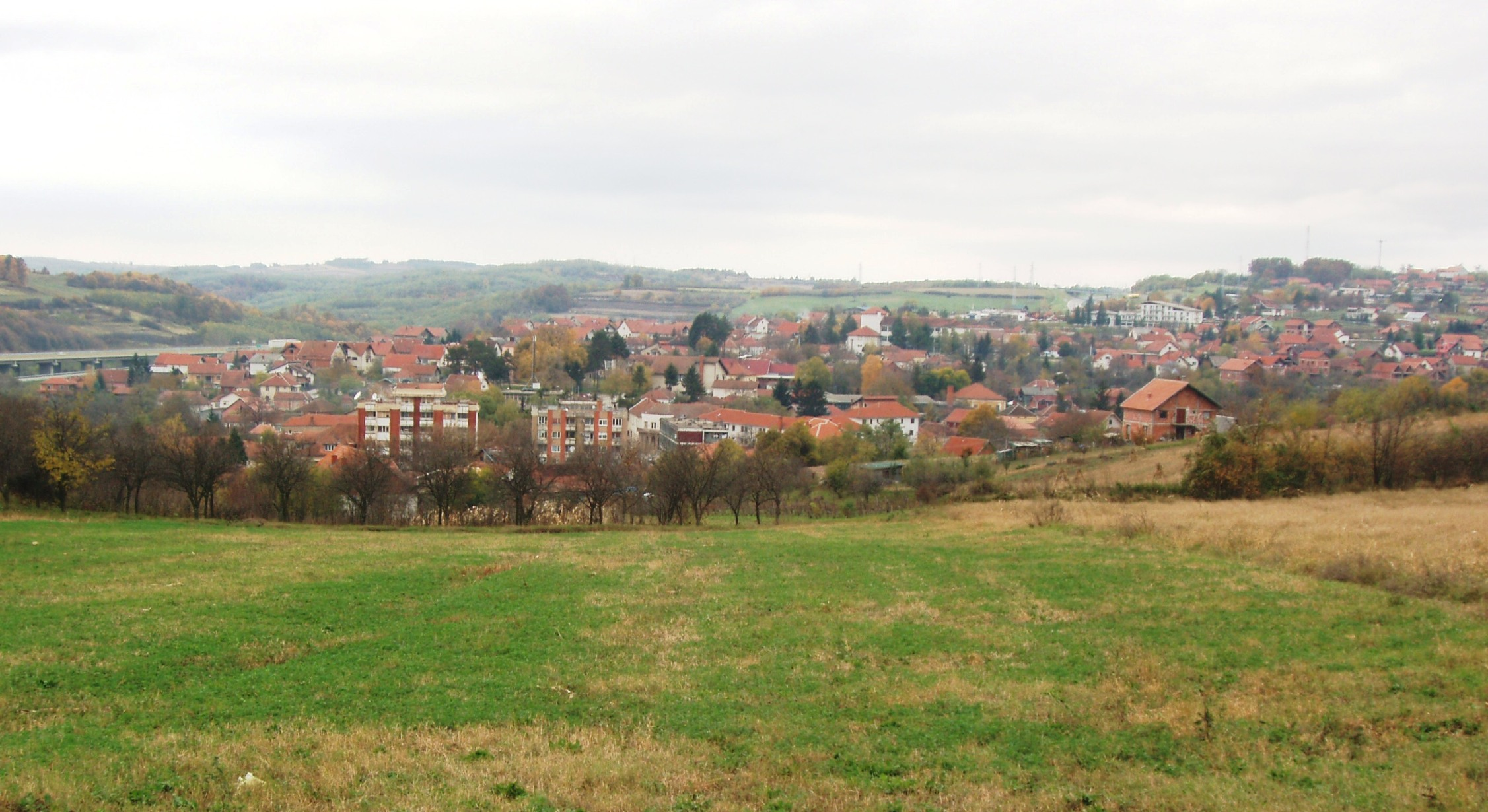 Панорама Ражња